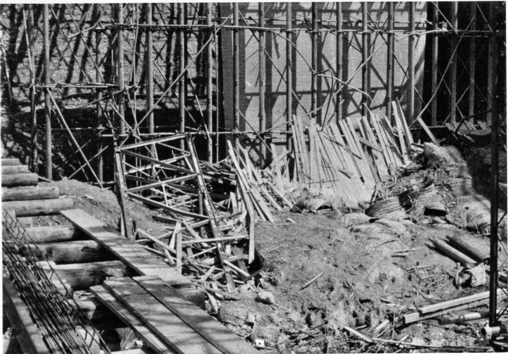 Zusammenbruch der Leubasbrücke April 1974